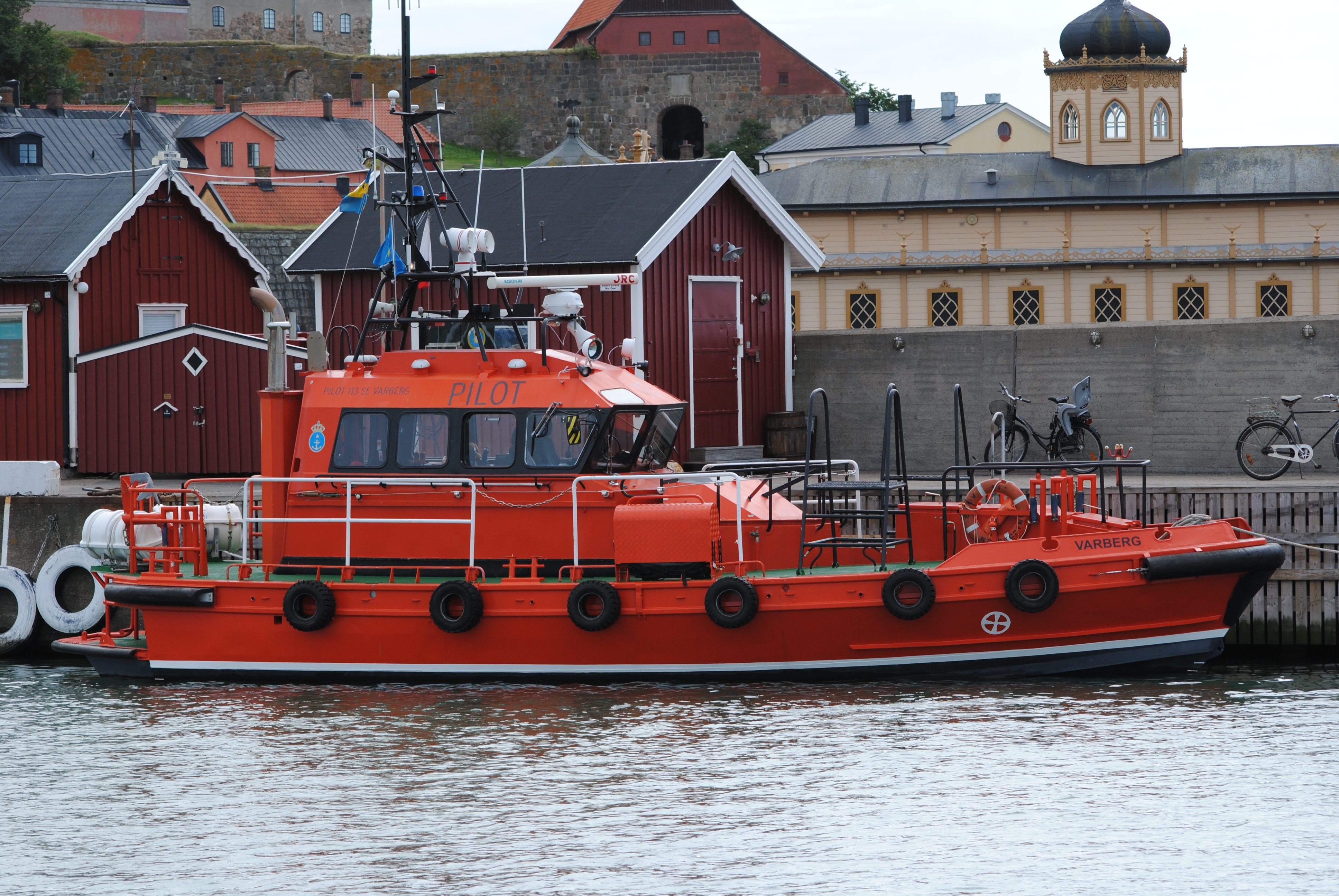 Pilot 113 i Varberg